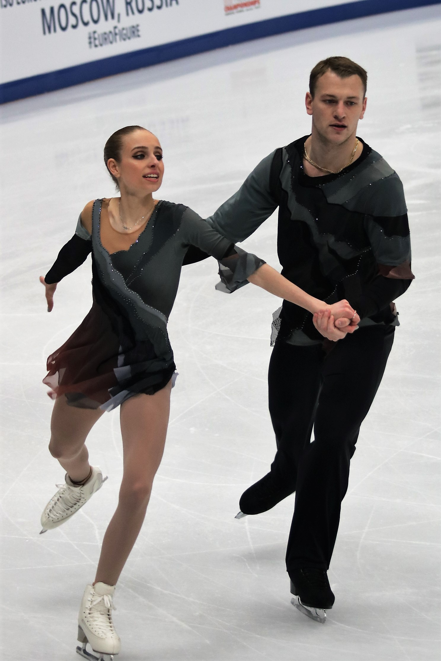 Пэйдж Коннорс / Евгений Краснопольский (Израиль) на Чемпионате Европы по фигурному катанию 2018